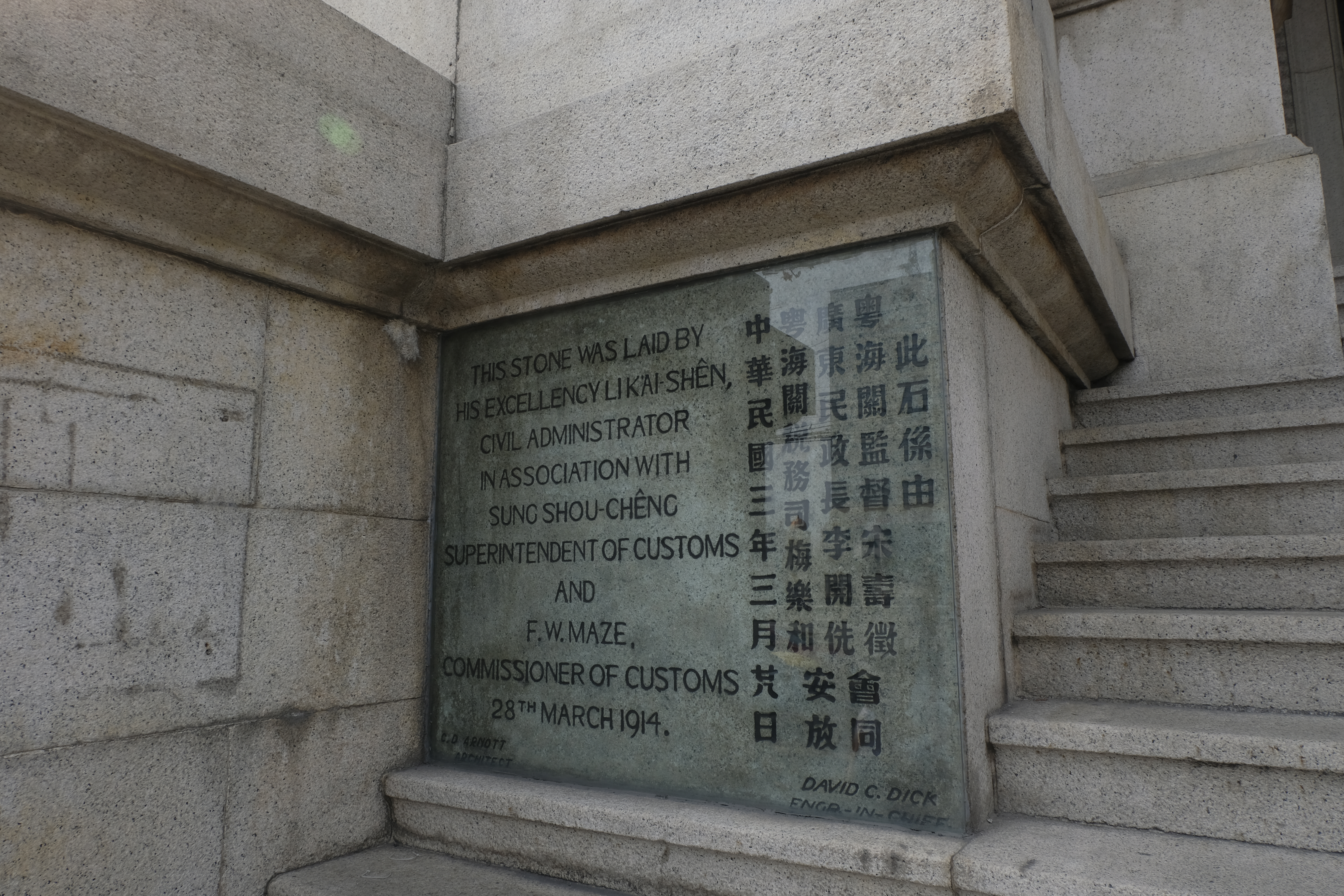 粤海关大楼奠基石